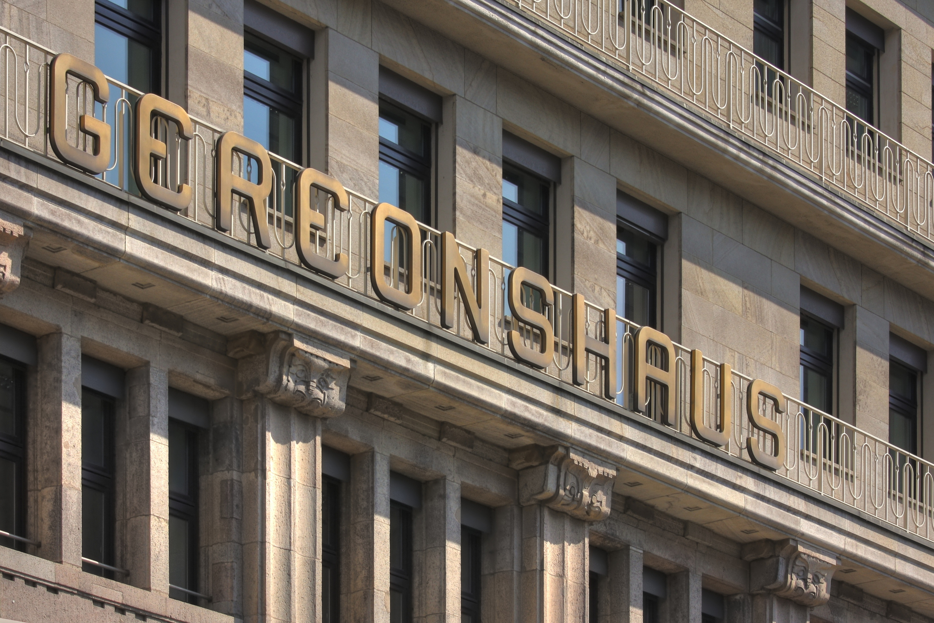 Gereonshaus, Gereonstraße 18-32, Köln. Architekt: Carl Moritz, Baujahr: 1909/10